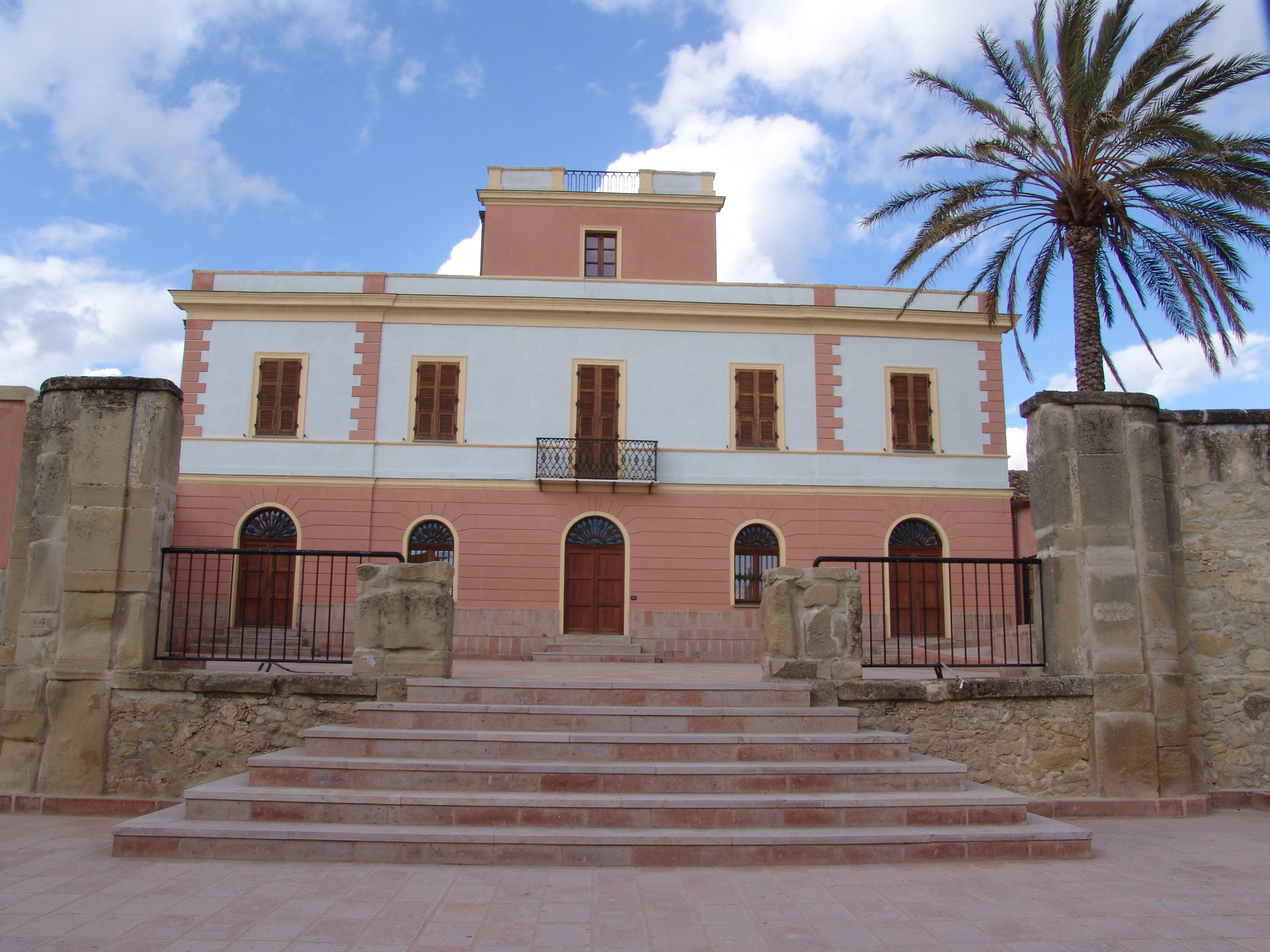 Villa de Villa This is a photo of a monument which is part of cultural heritage of Italy.